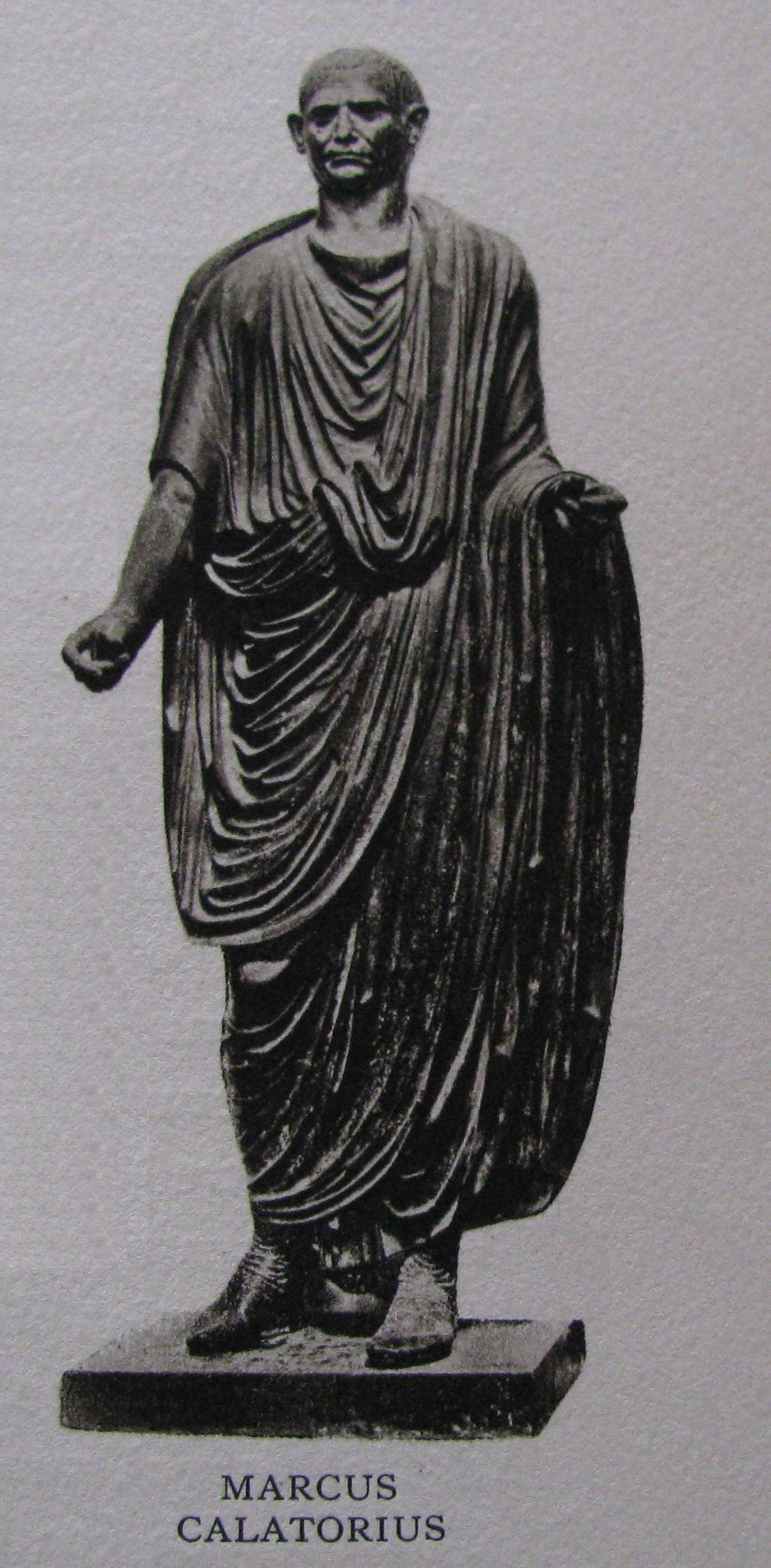 Statua togata in bronzo di Marcus Calatorius Quartio